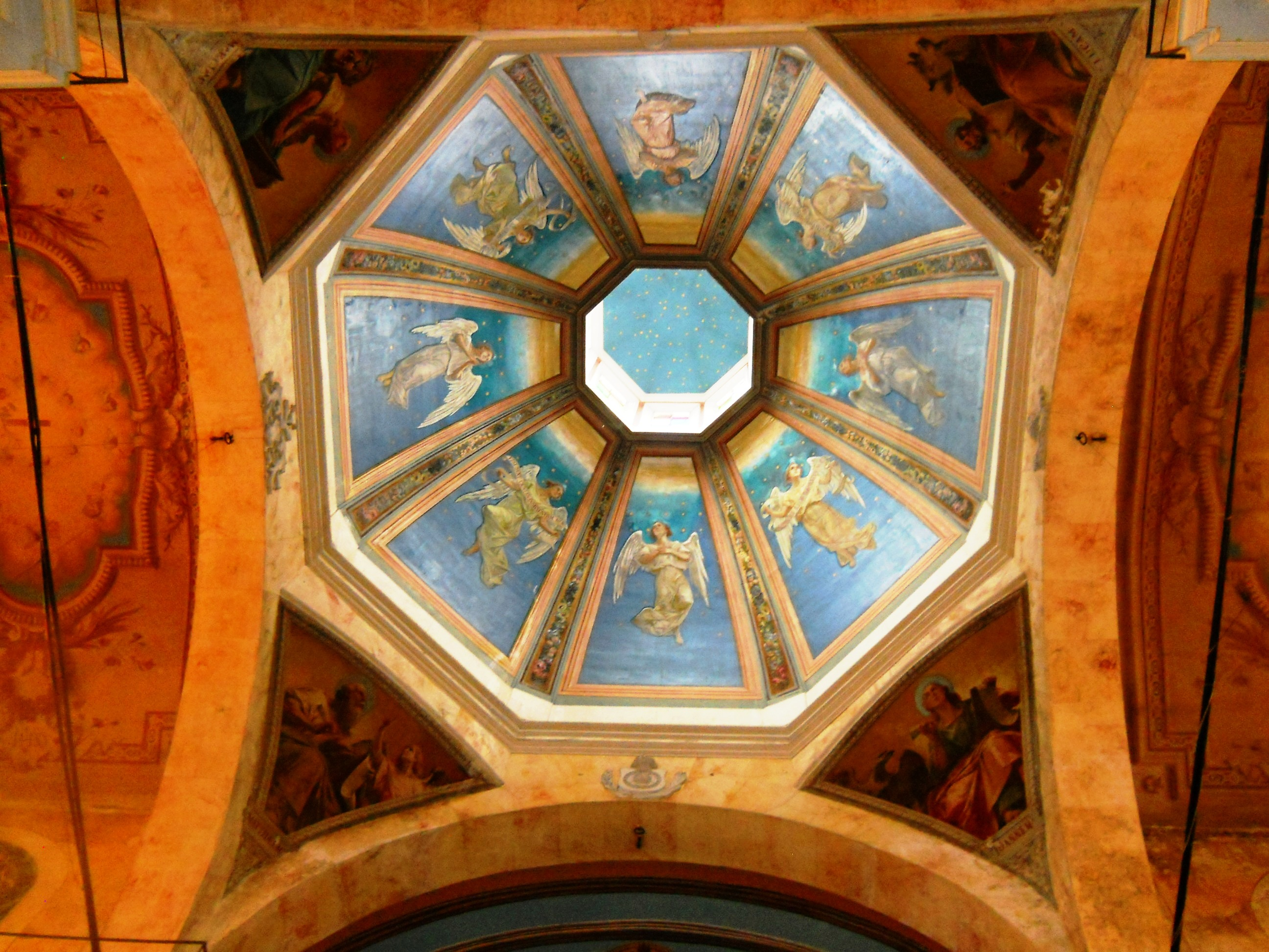 Centro Histórico de Manaus